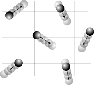 Atomernas eller molekylernas termiska rörelse i en gas;dessa får röra sig fritt och växelverkan kan försummas. Skapad av Rogper